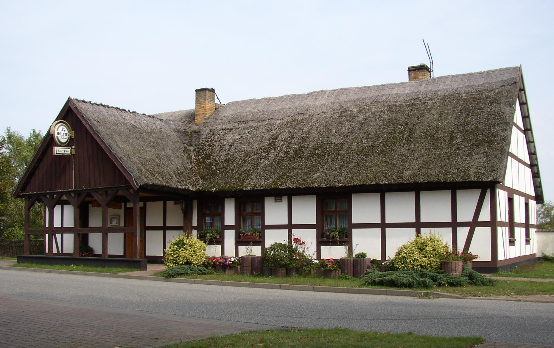 Vorlaubenhaus in Neustadt-Plänitz in Brandenburg, Deutschland („Alte Post“, Dorfstr. 15)